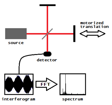 מייקלסון 7